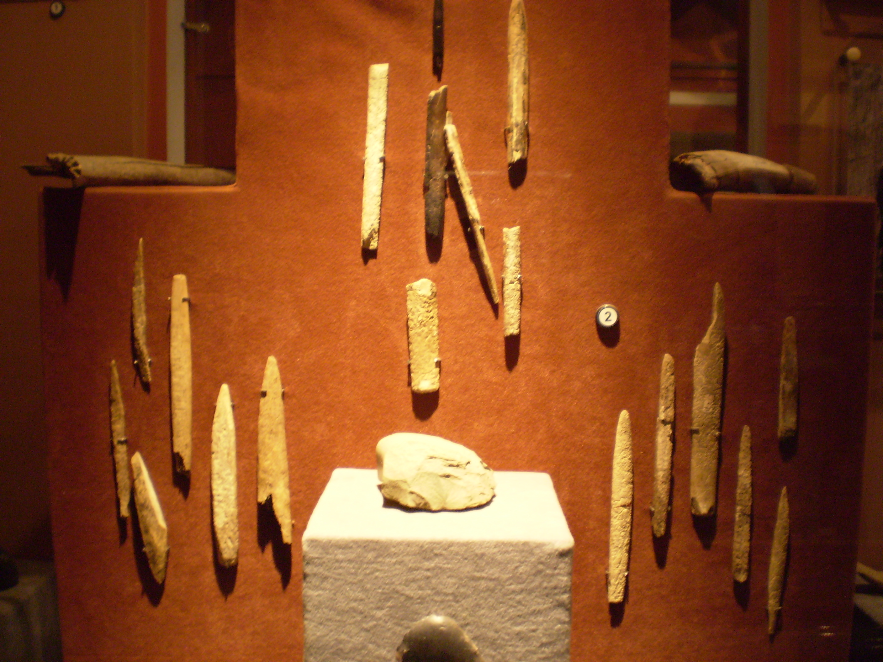 Находки с Афонтовой горы. Красноярский краевеческий музей.